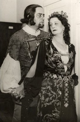 Újházy György: A tékozló Fiú. Nemzeti Színház. Bemutató: 1934/11/02, rendező: Horváth Árpád. Poroszlók hadnagya: Harasztos Gusztáv, Szerető: T. Mátray Erzsi.